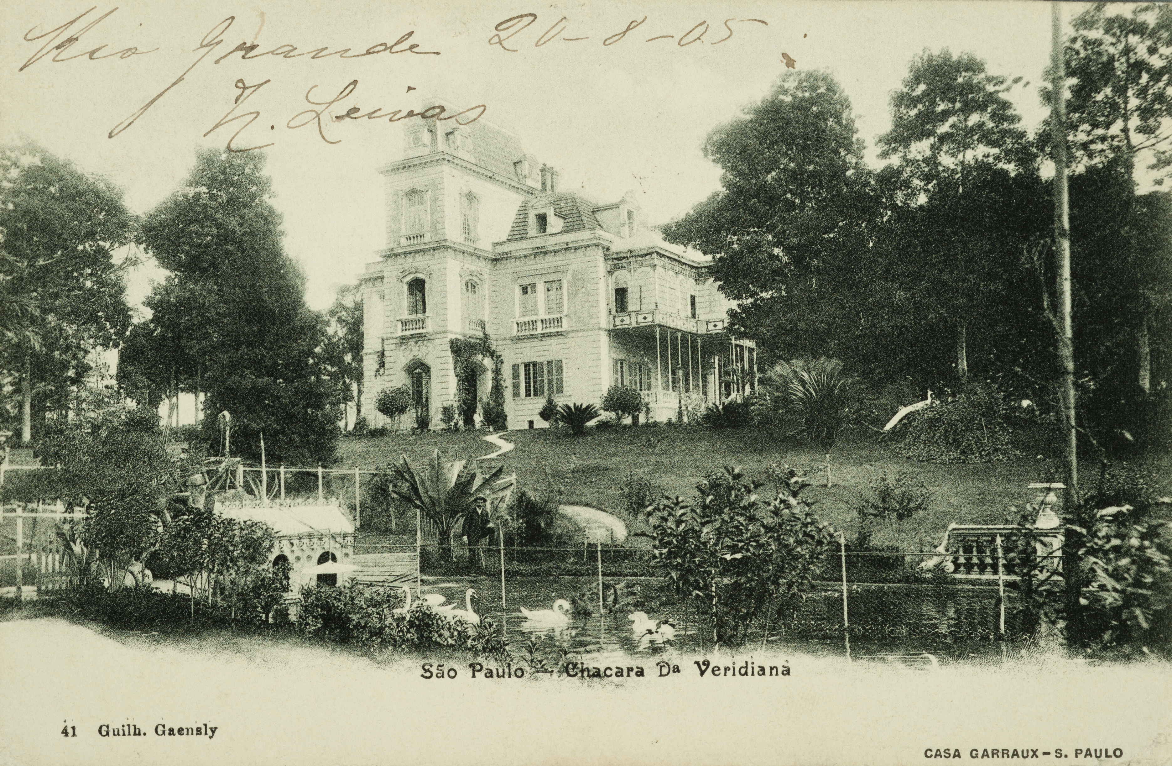 Obra que integra o acervo do Museu Paulista da USP.